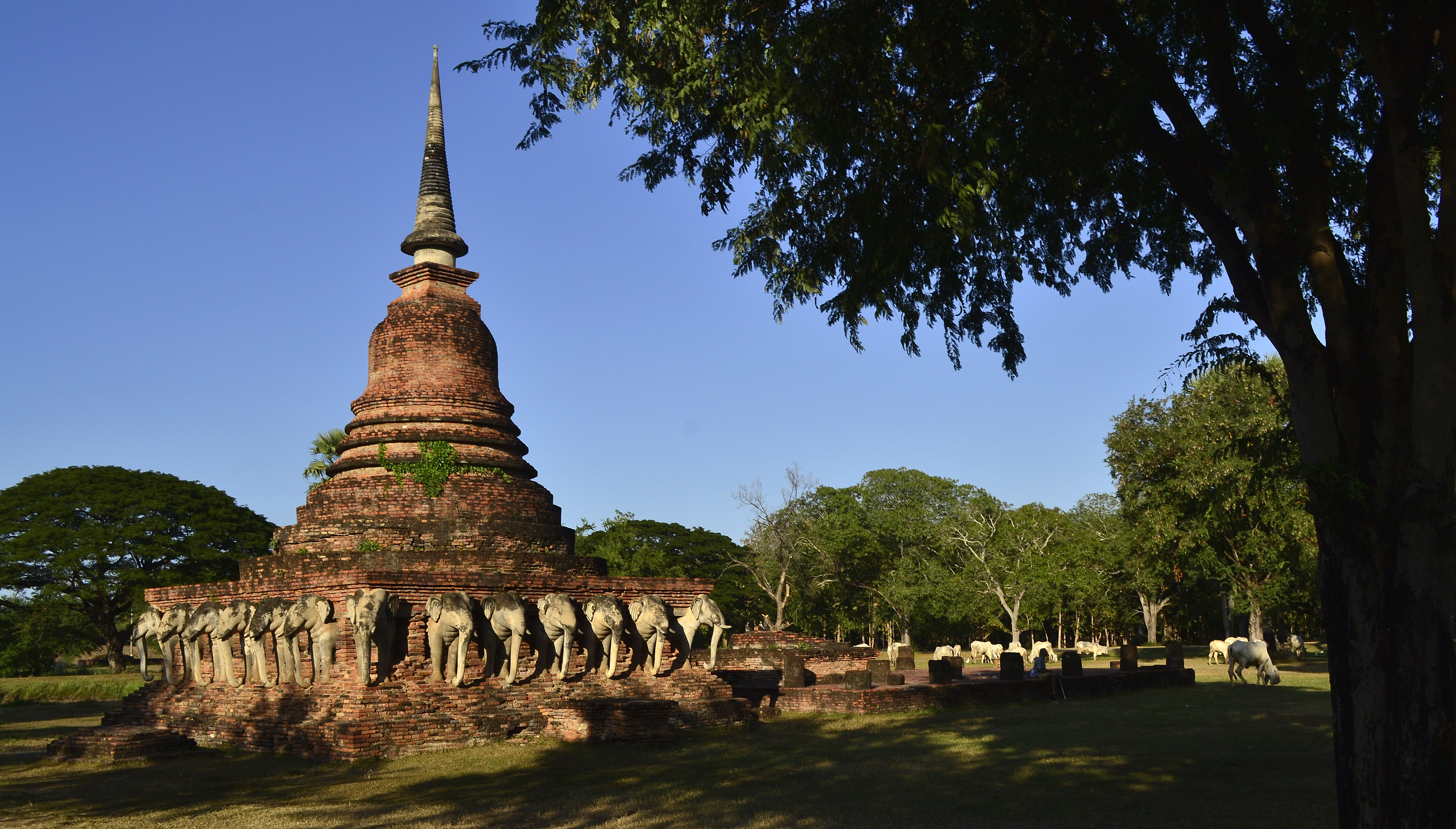 Wat Sorasan im Geschichtspark Sukhothai